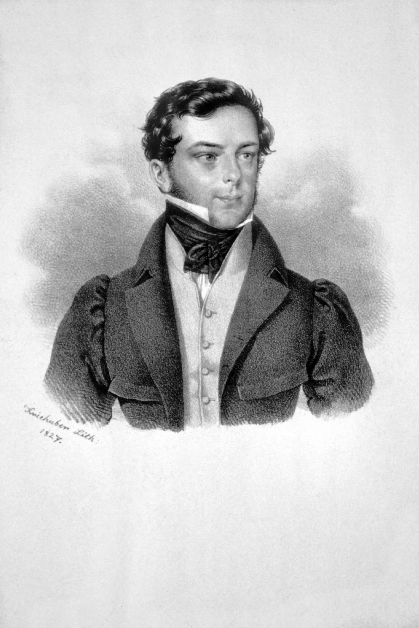 Johann Adolf II von Schwarzenberg (1799-1888), Fürst. Lithographie von Josef Kriehuber, 1827